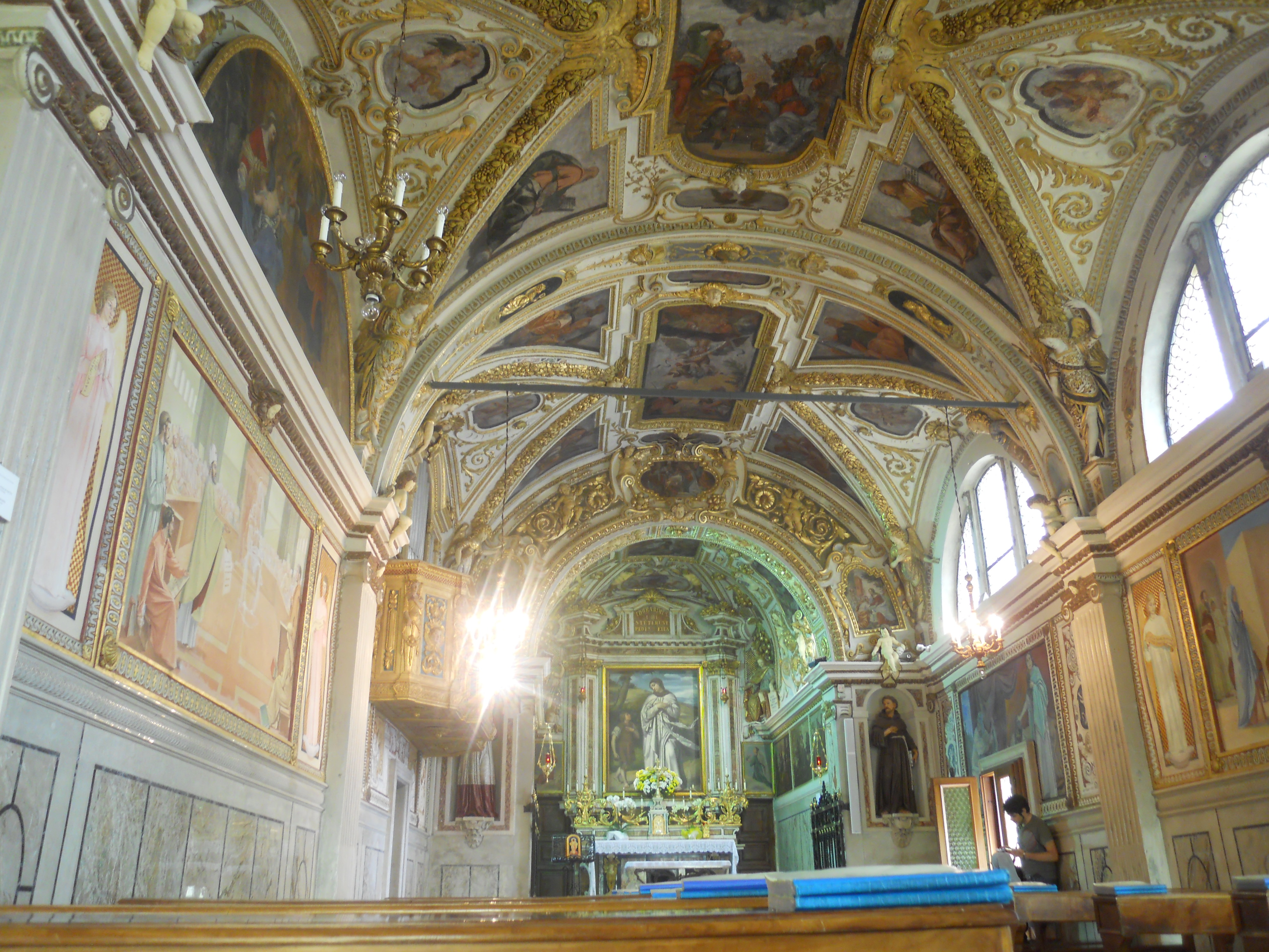 Santuario della Madonna di Paitone